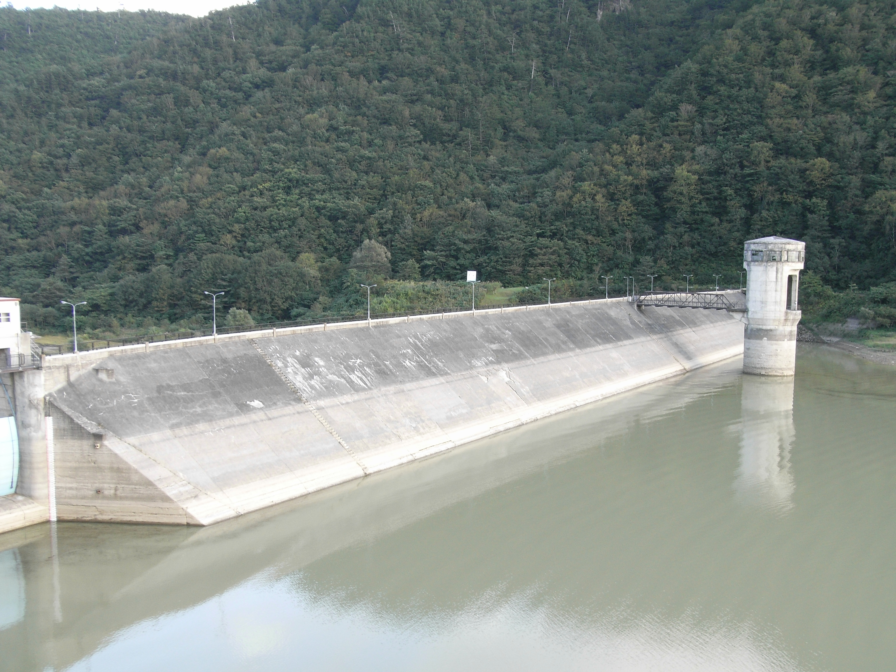 Dam